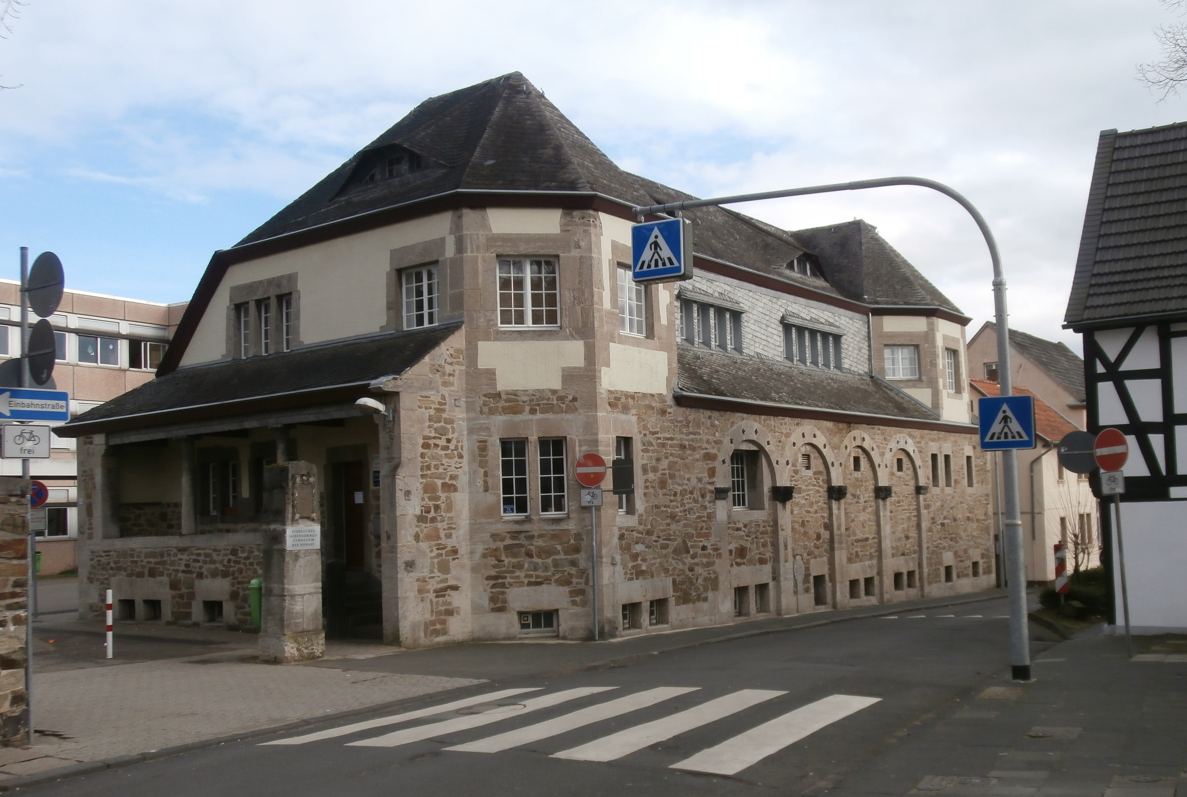 Feuerschlößchen, Rommersdorfer Straße 78–82, Bad Honnef: Pförtnerhäuschen